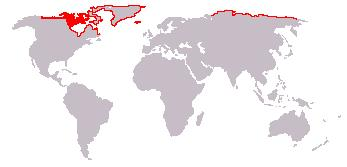 Bewerking afbeelding : afbeelding_(kaart).jpg